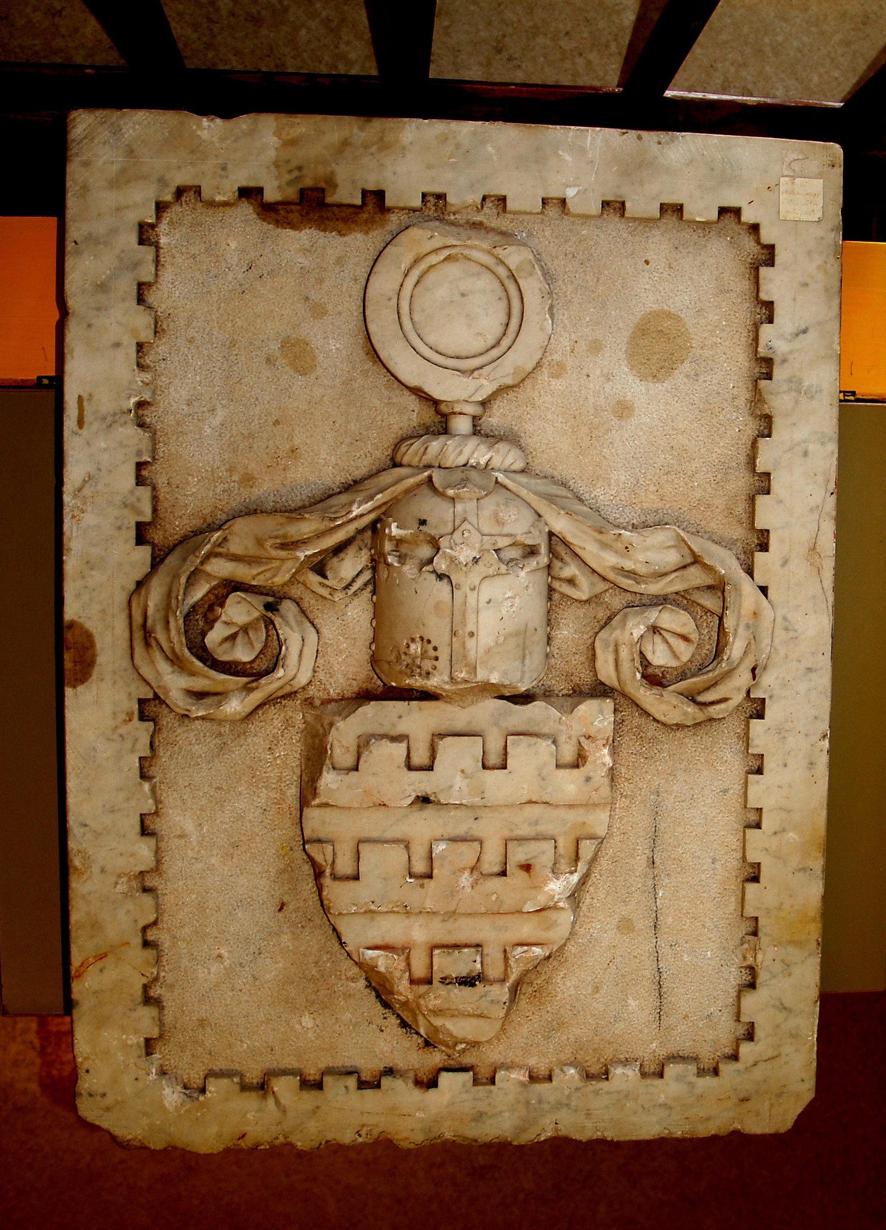 Krüdeneride marmorvapp Suislepas